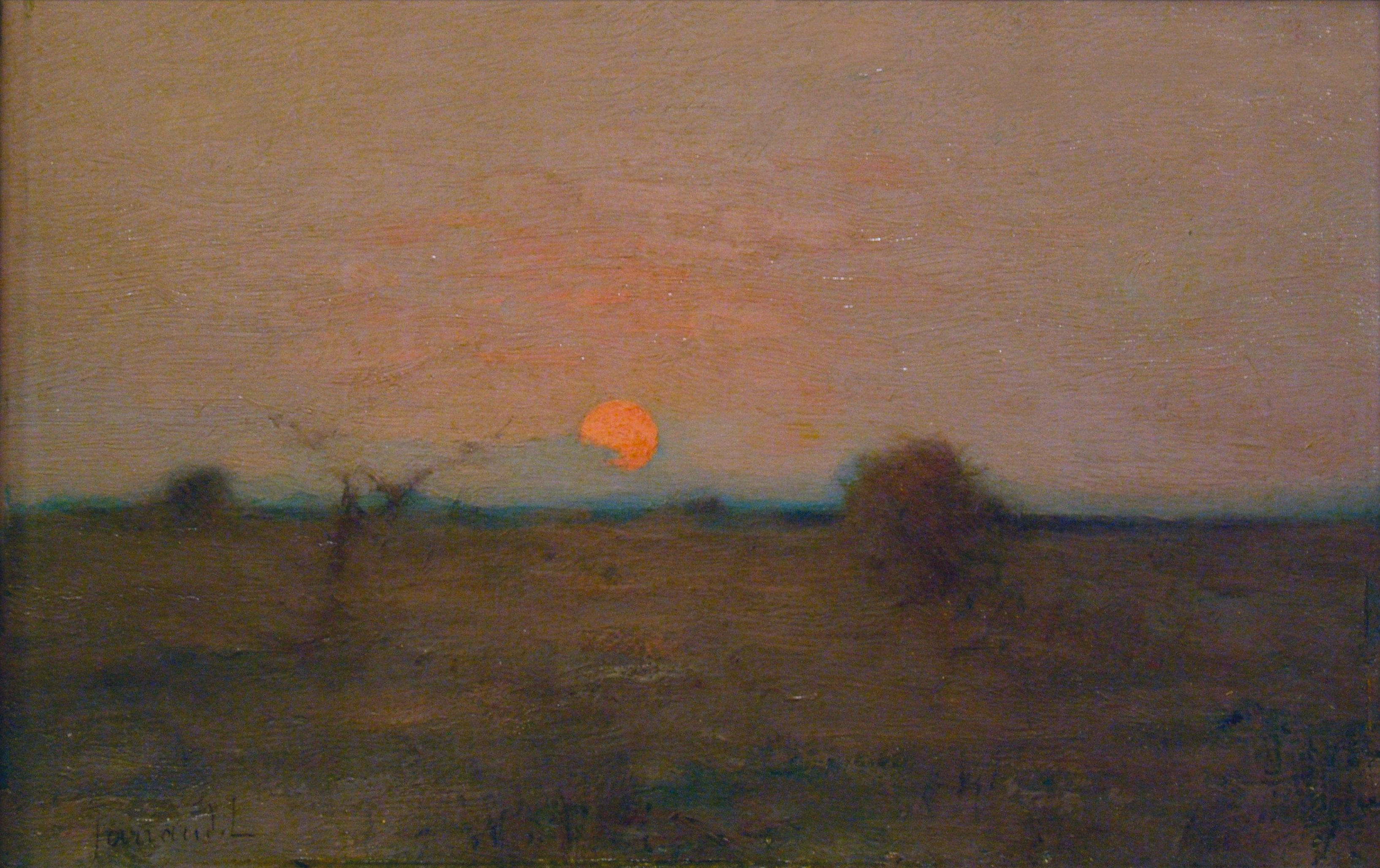 Léonard Jarraud : Coucher de soleil (15,5 x 23 cm), non daté. Musée d'Angoulême, Charente (France).